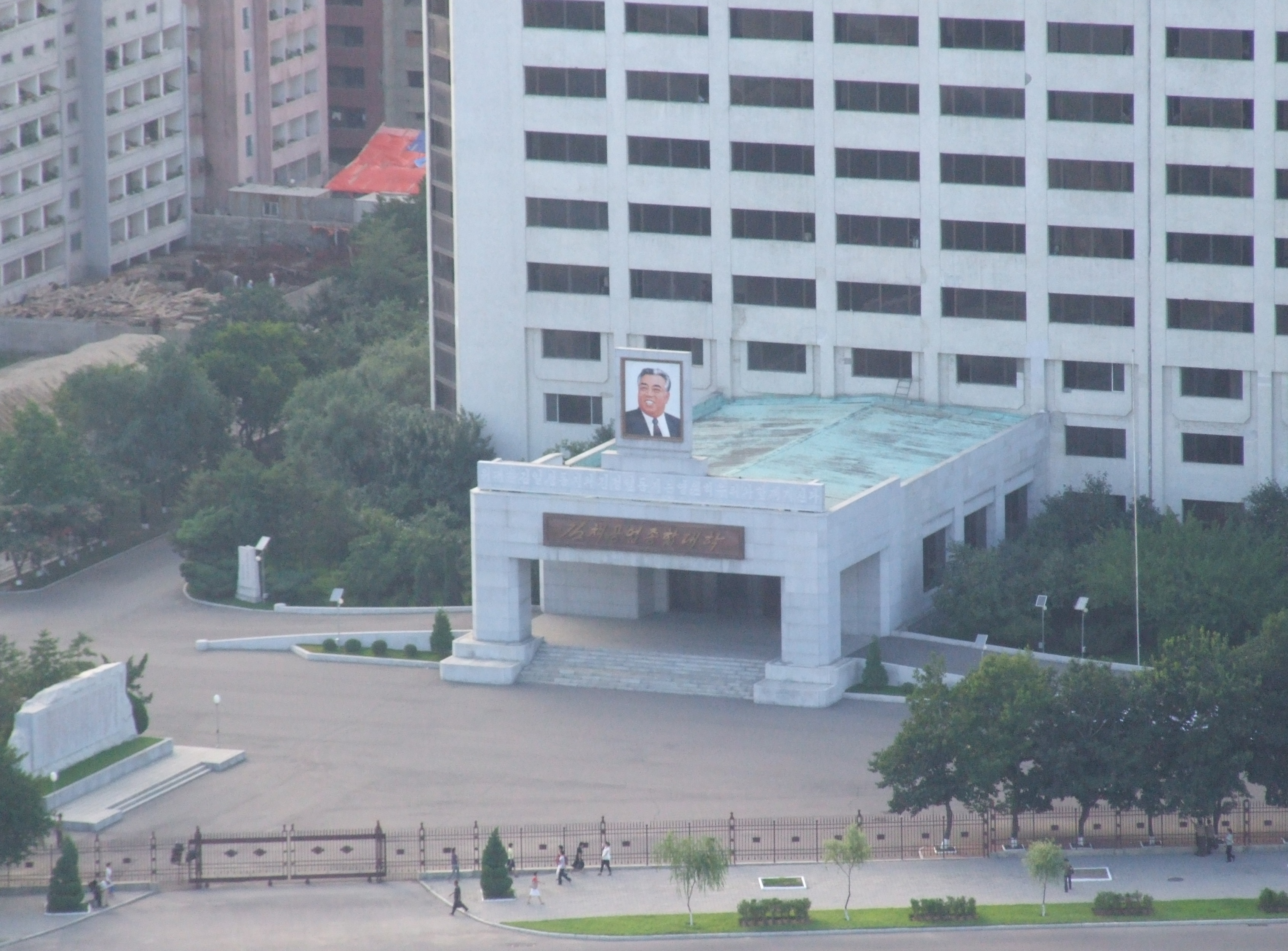 View from Yanggakdo International Hotel. Kim Chaek University of Technology in Otan-Kangan Street